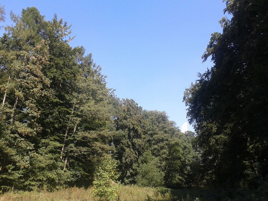 Bullerbach-Grünzug in Sennestadt, Jesus-Christus-Kirche